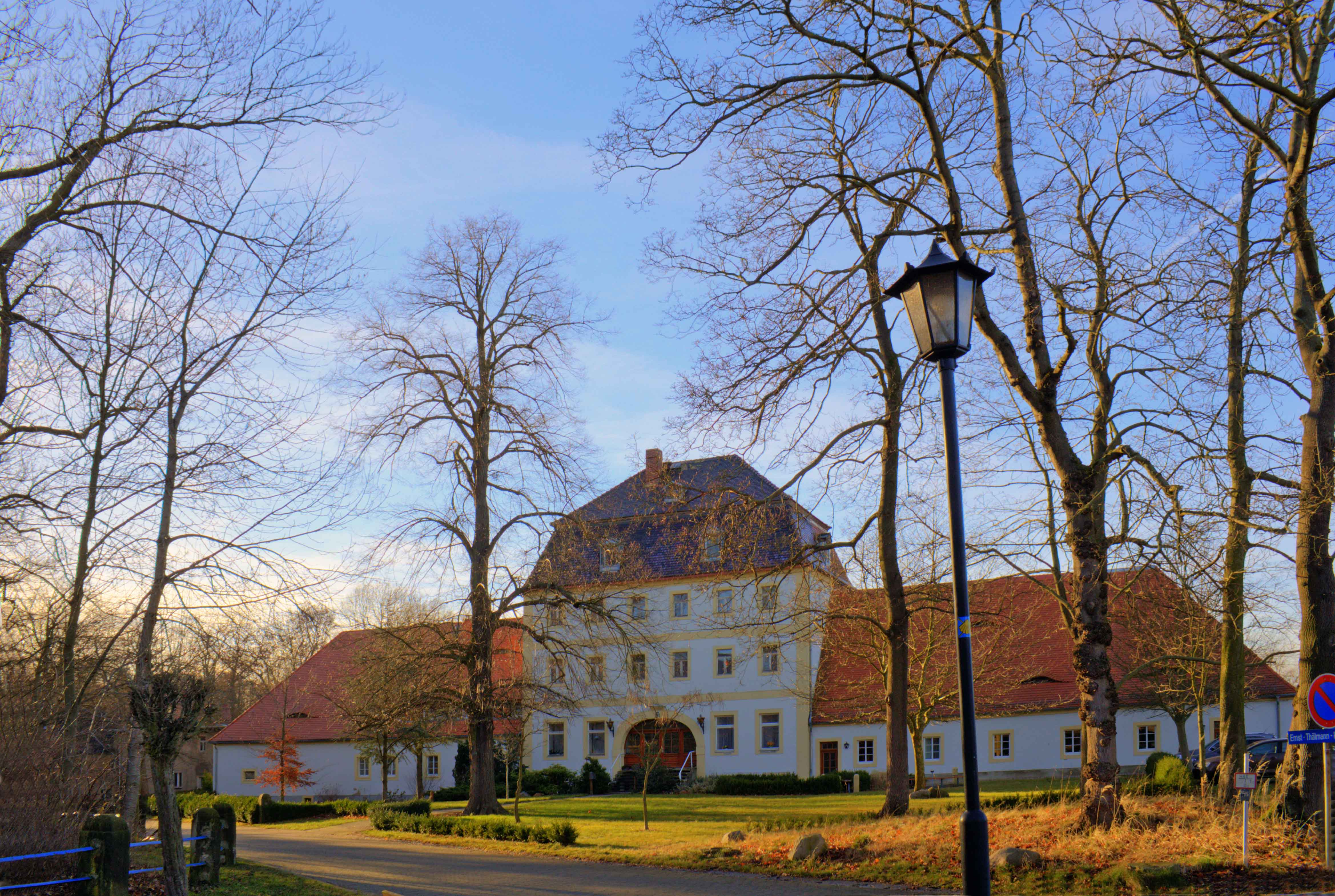 Gutshaus Börln, Clara-Zetkin-Straße 1 ff. in Dahlen Stt Börln